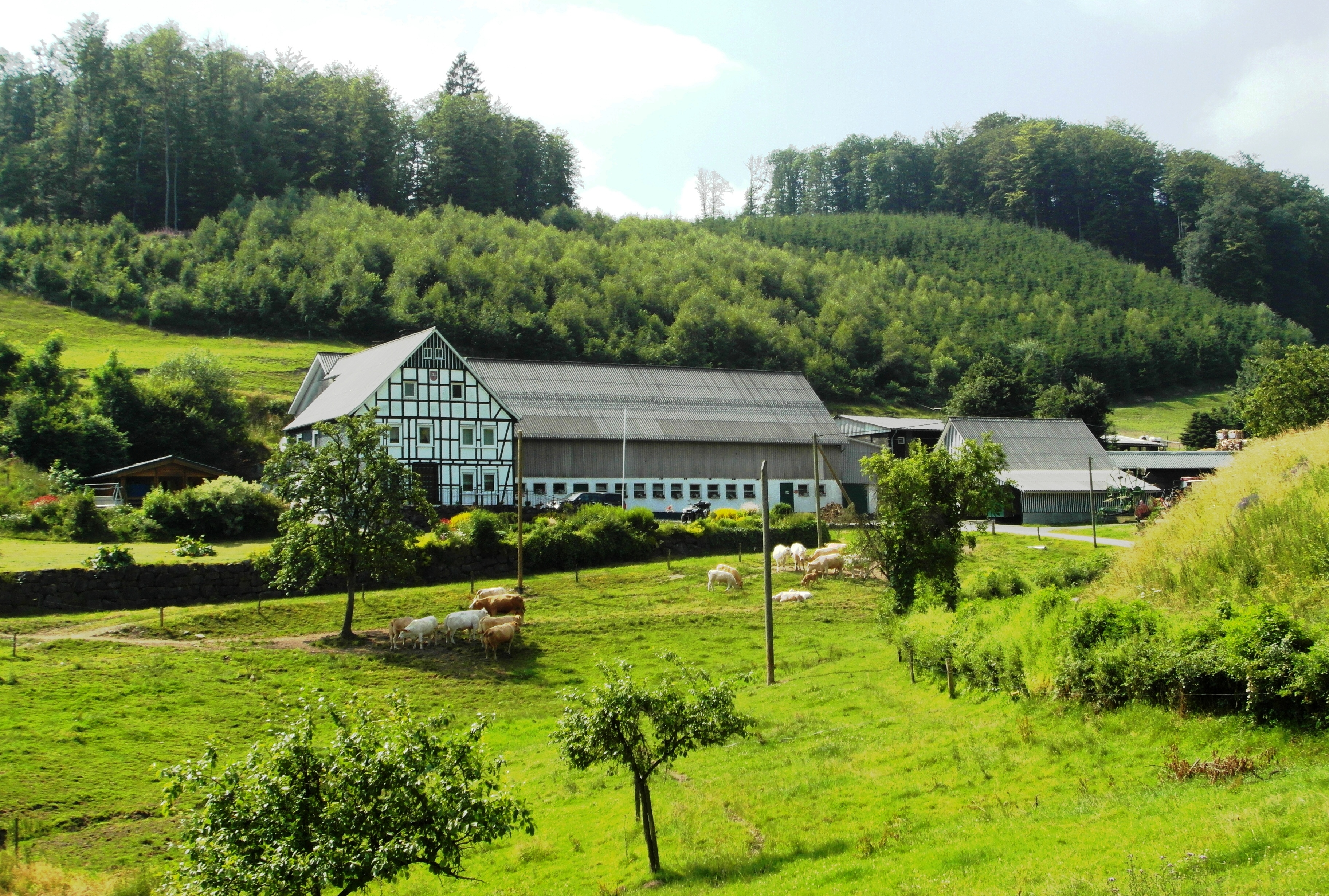 Elsperhusen - kleiner Ortsteil von Lennestadt